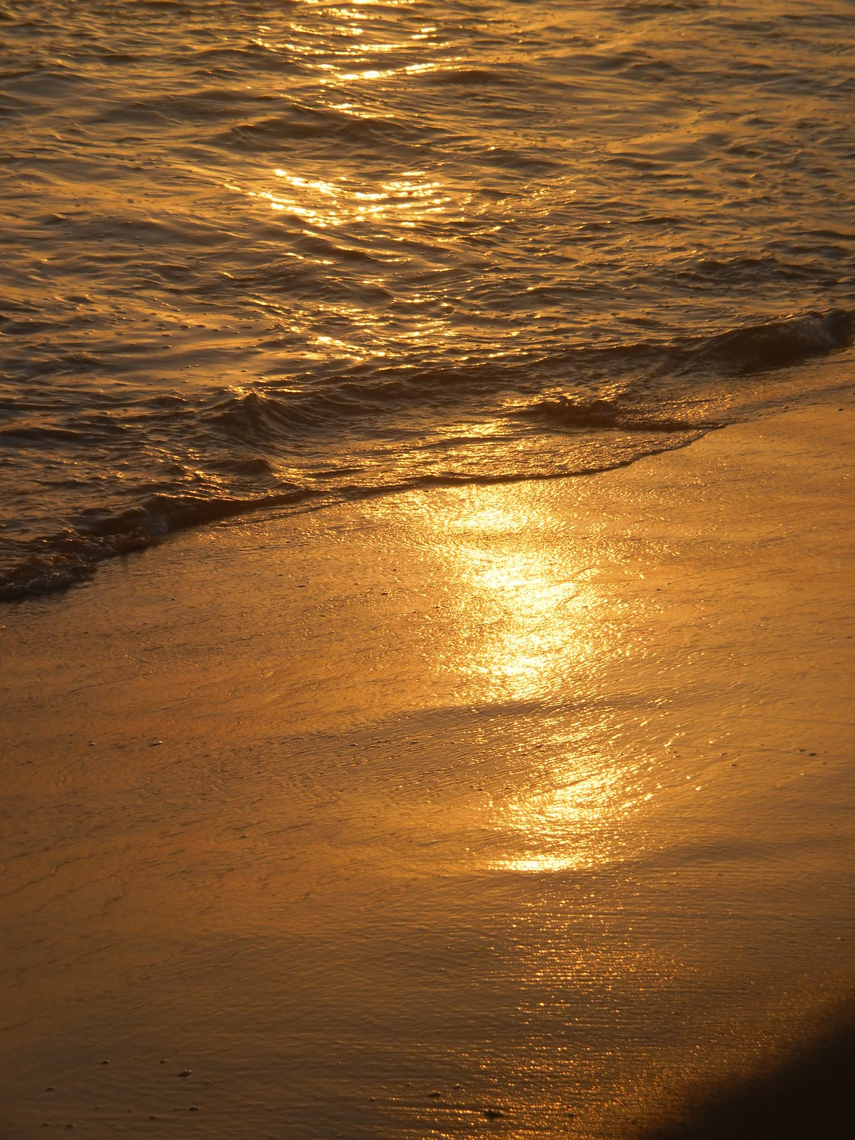 Sunset at Shankhumugham Beach, Kerala ഈ മീഡിയ പ്രമാണം മലയാളികൾ വിക്കിമീഡിയയെ സ്നേഹിക്കുന്നു - 2 പദ്ധതിയുടെ ഭാഗമായി ചേർത്തതാണ്.